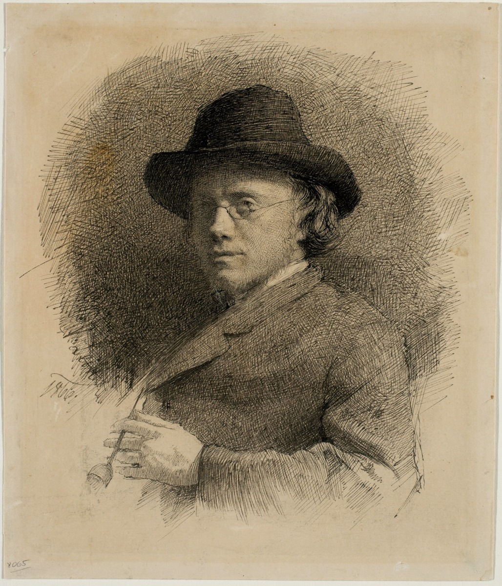 Der Maler Karl Appold (1840-1884), gezeichnet von Wilhelm Leibl (1844-1900)